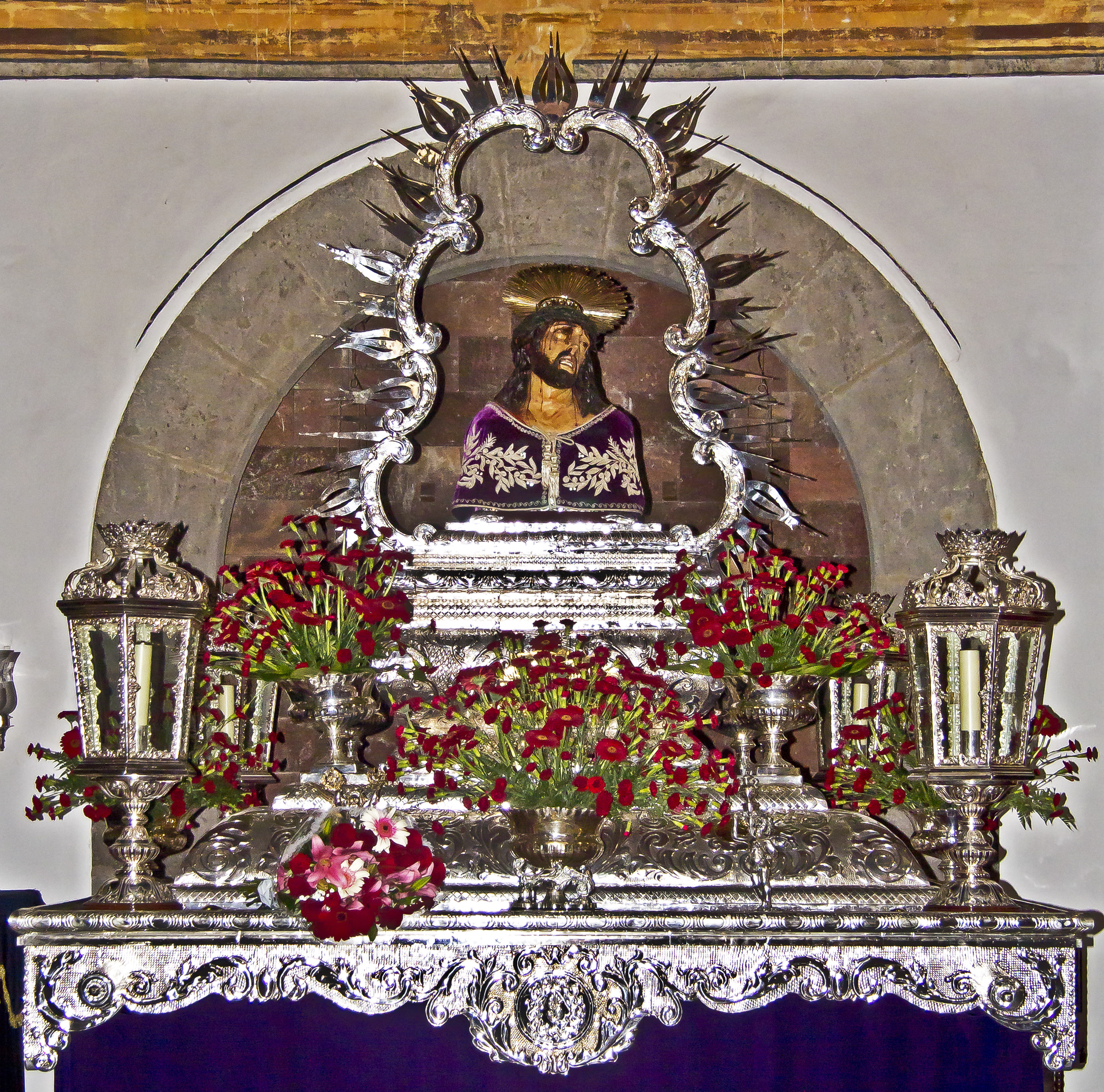 Die Figur des „Señor de las Tribulaciones“ befindet sich hier auf der Transporteinrichtung für die Prozession in der Karwoche in der Kirche San Francisco in Santa Cruz de Tenerife.